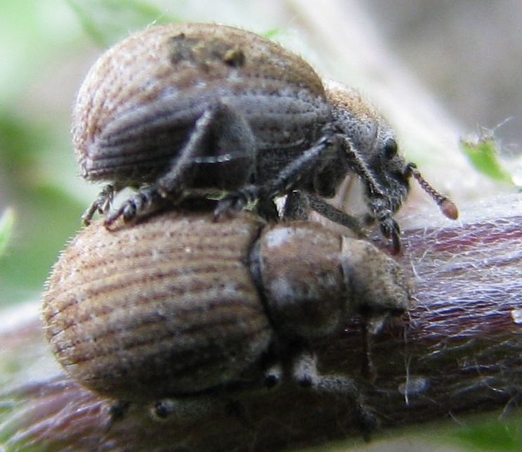 To eksemplarer av bredsnutebilla Philopedon plagiatus.Template:Byline